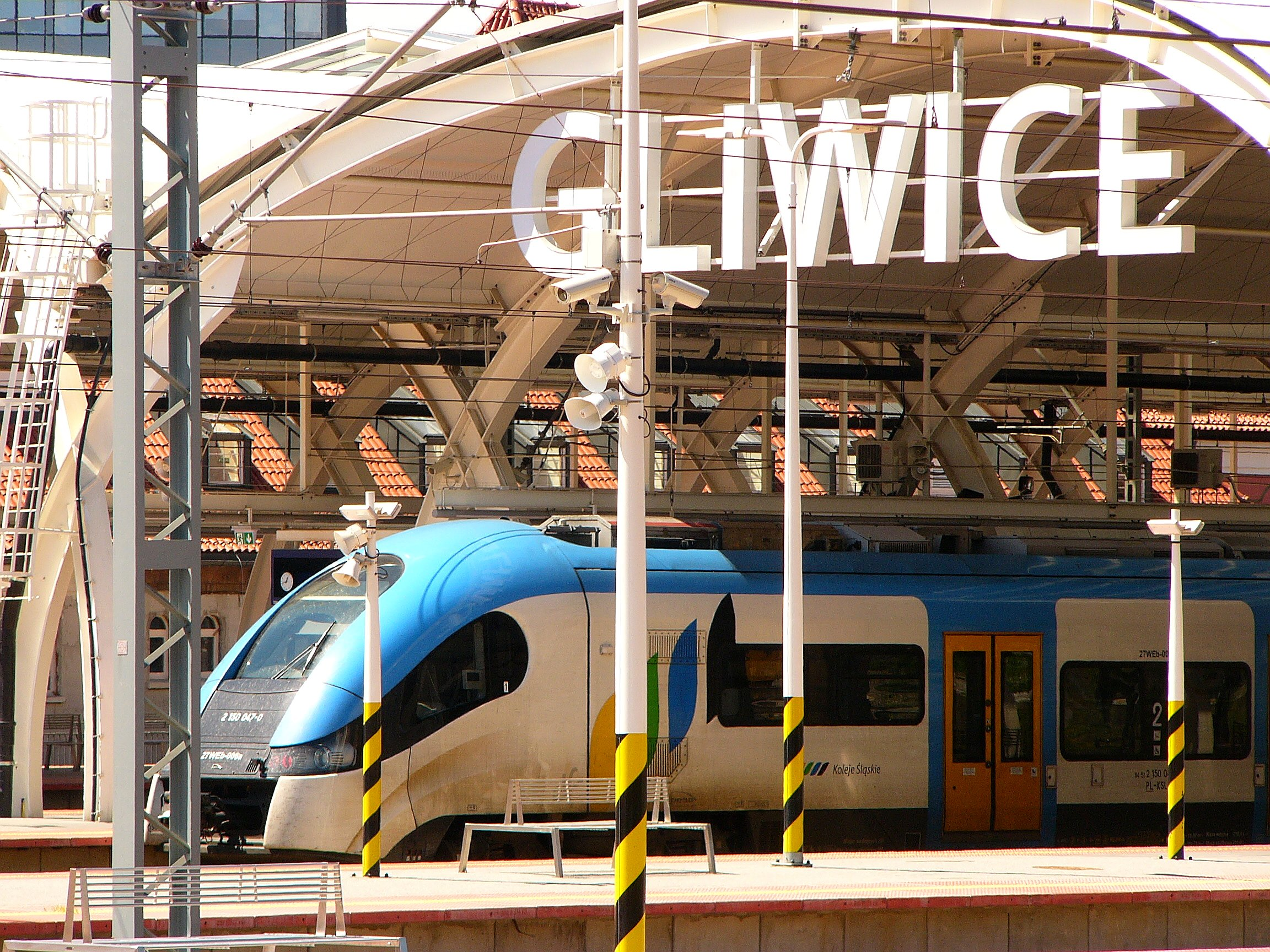 Eine moderne Lok der "Schlesischen Bahnen" am frisch renovierten Bahnhof in Gleiwitz.